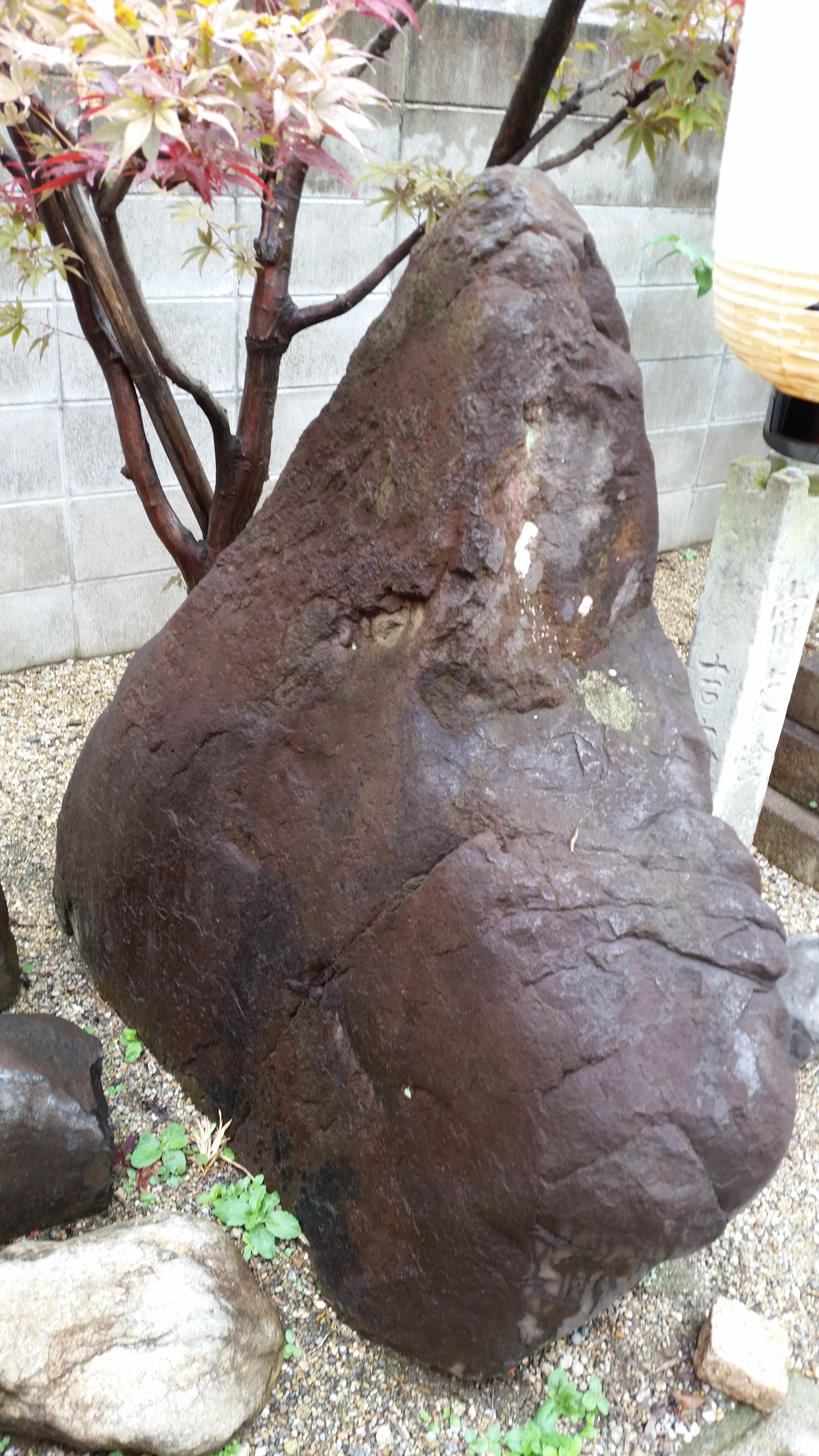 道祖神社陽石、奈良